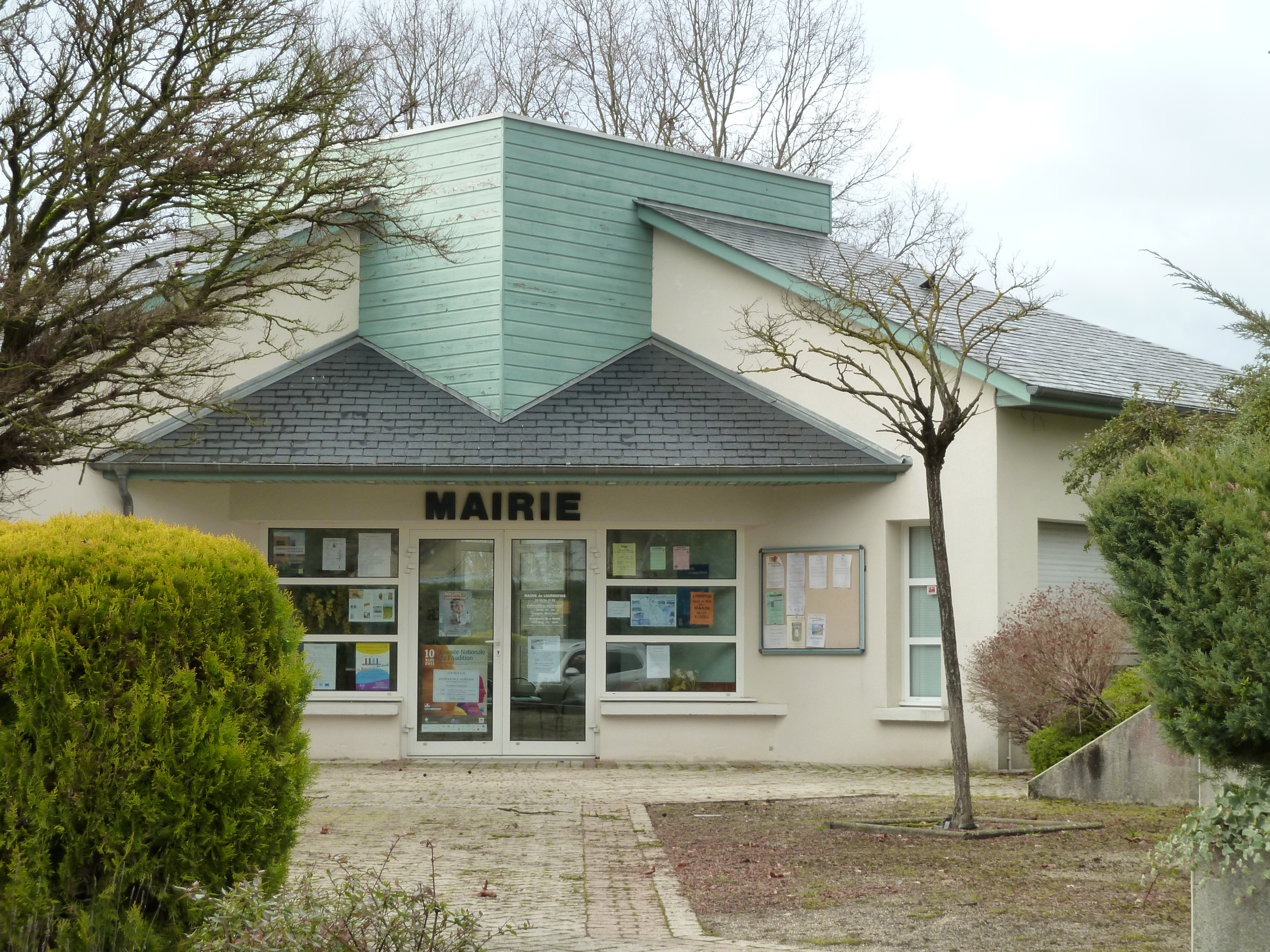 Mairie de Lourenties